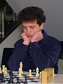 Mihail Feigin, Open A der Dortmunder Schachtage 1998.